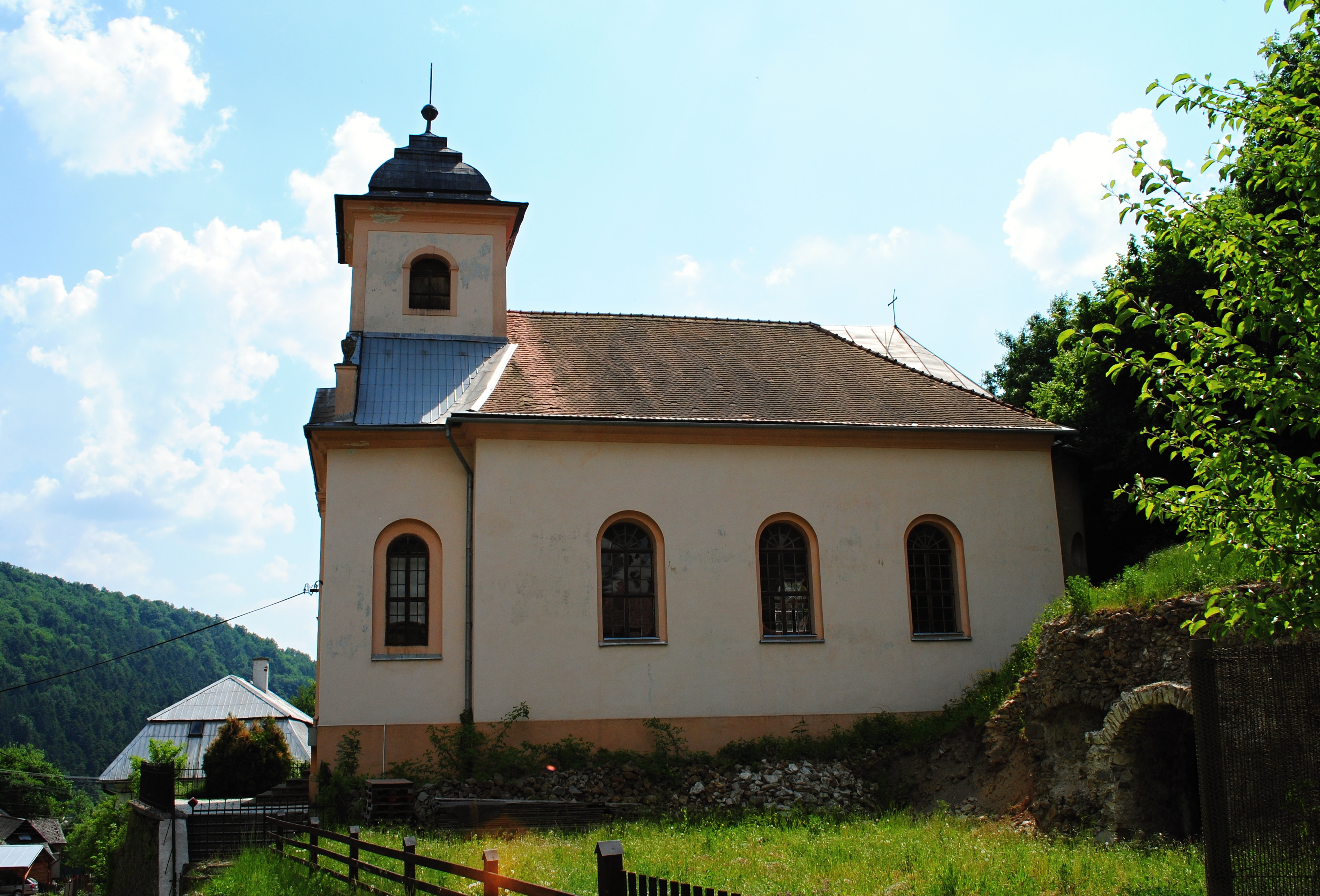 Kostol